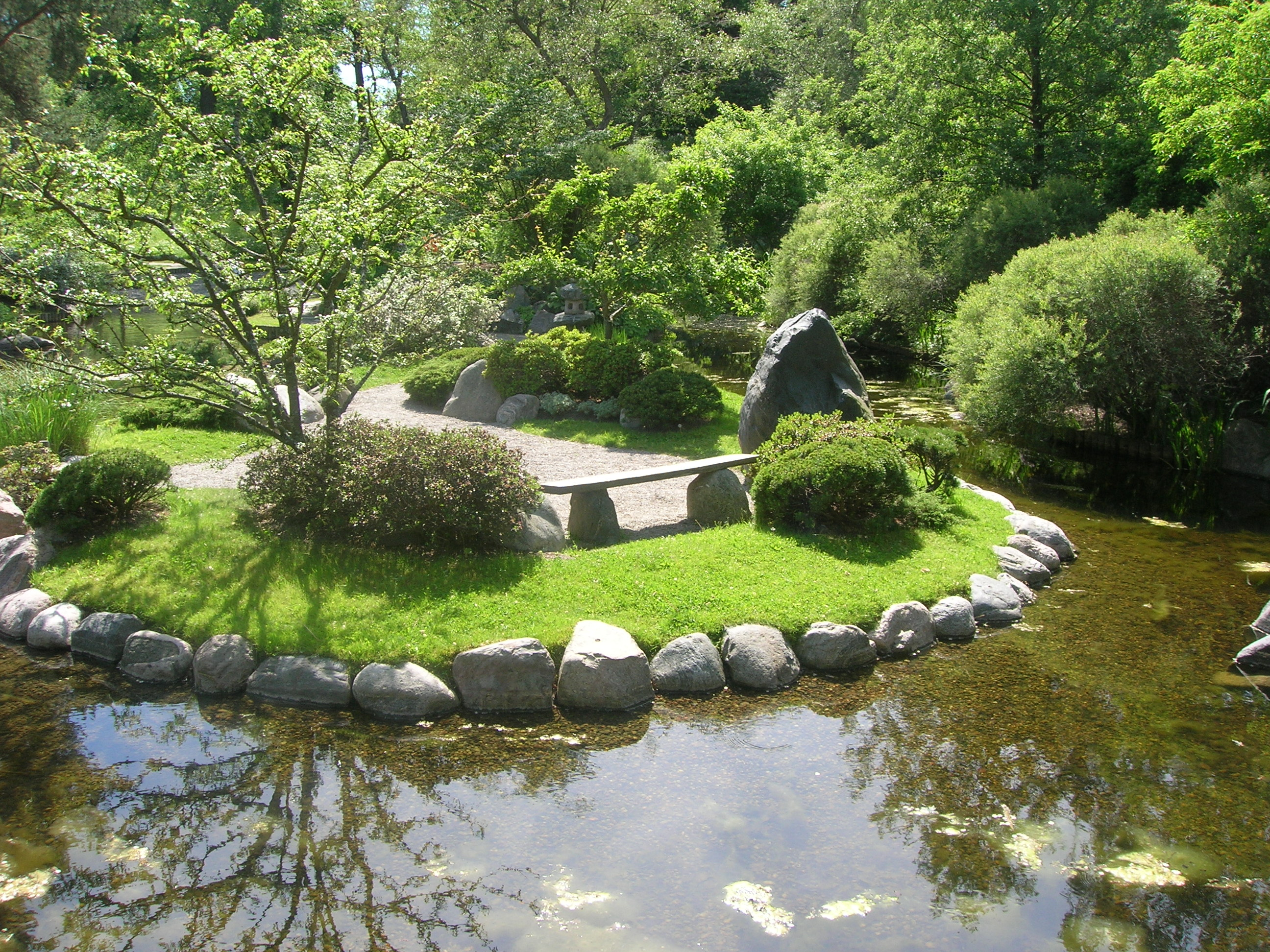 Japanska dammen, Bergianska Trädgården, Stockholm, Sweden.